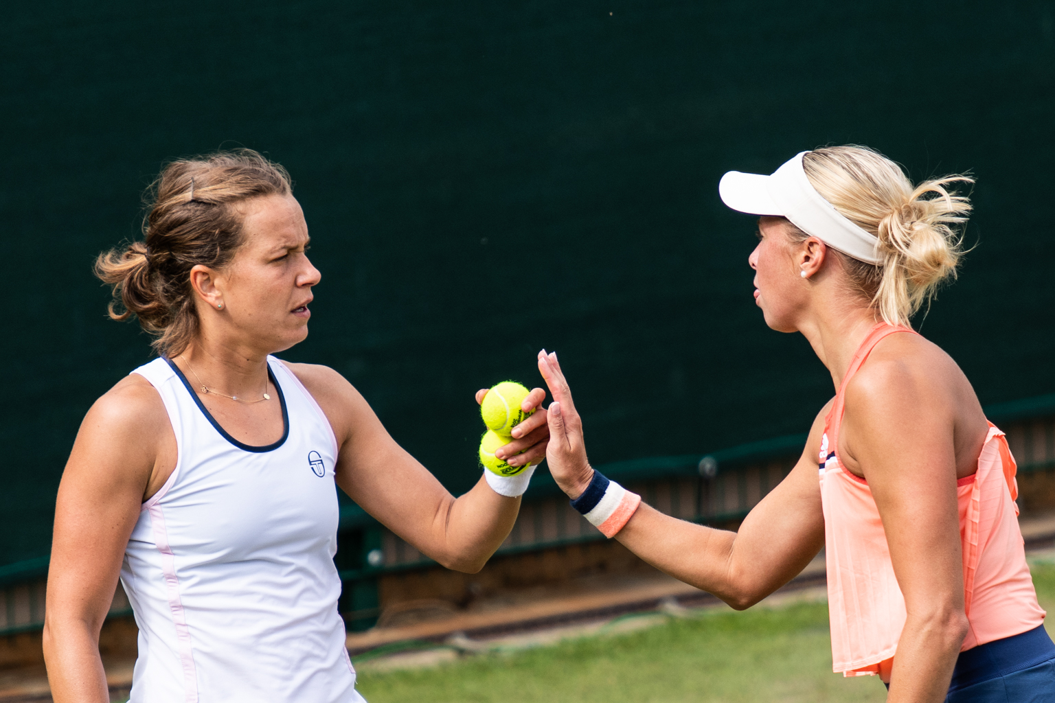 Barbora Strycova & Andrea Sestini Hlavackova